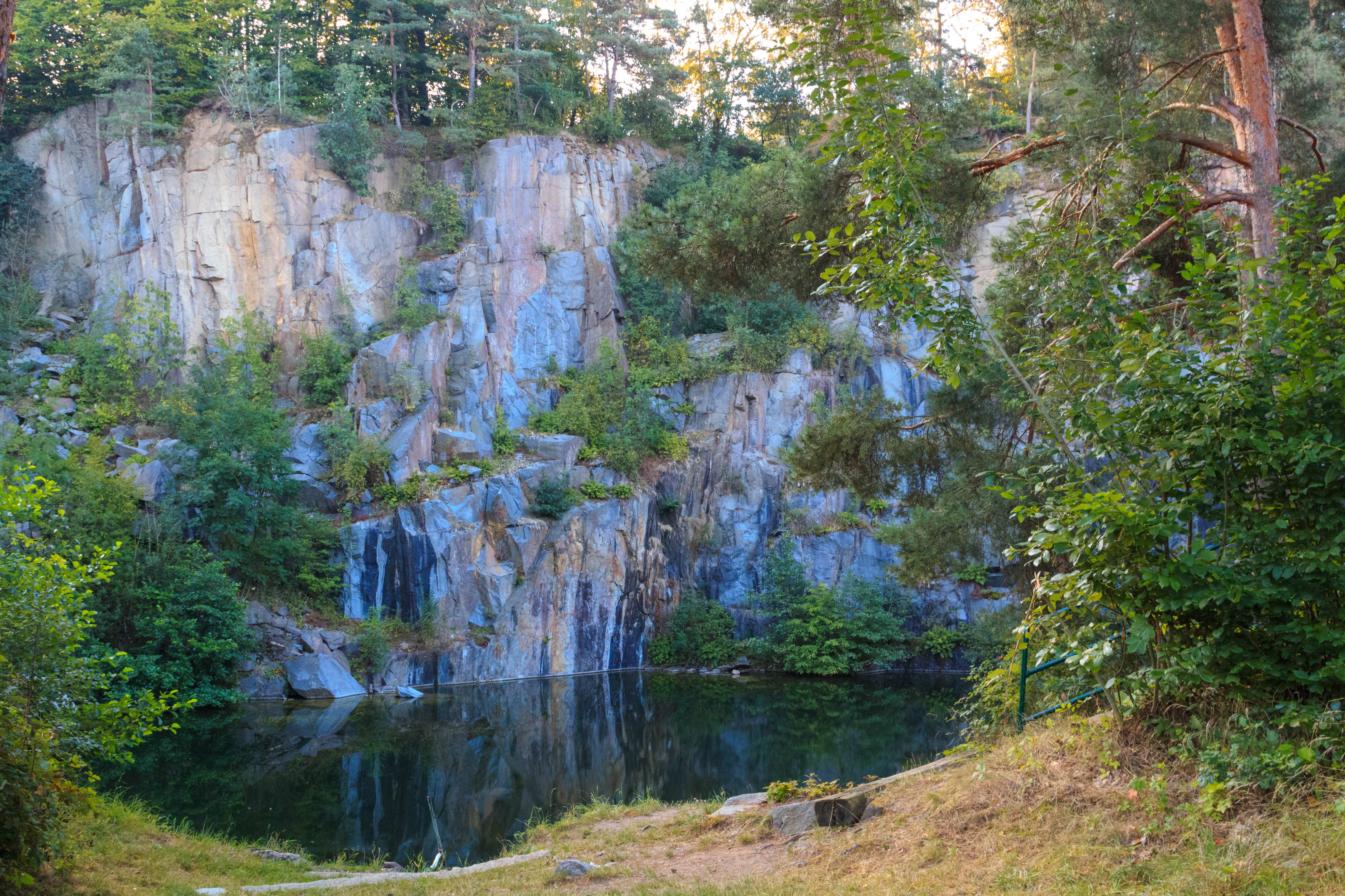 Lom Dubová